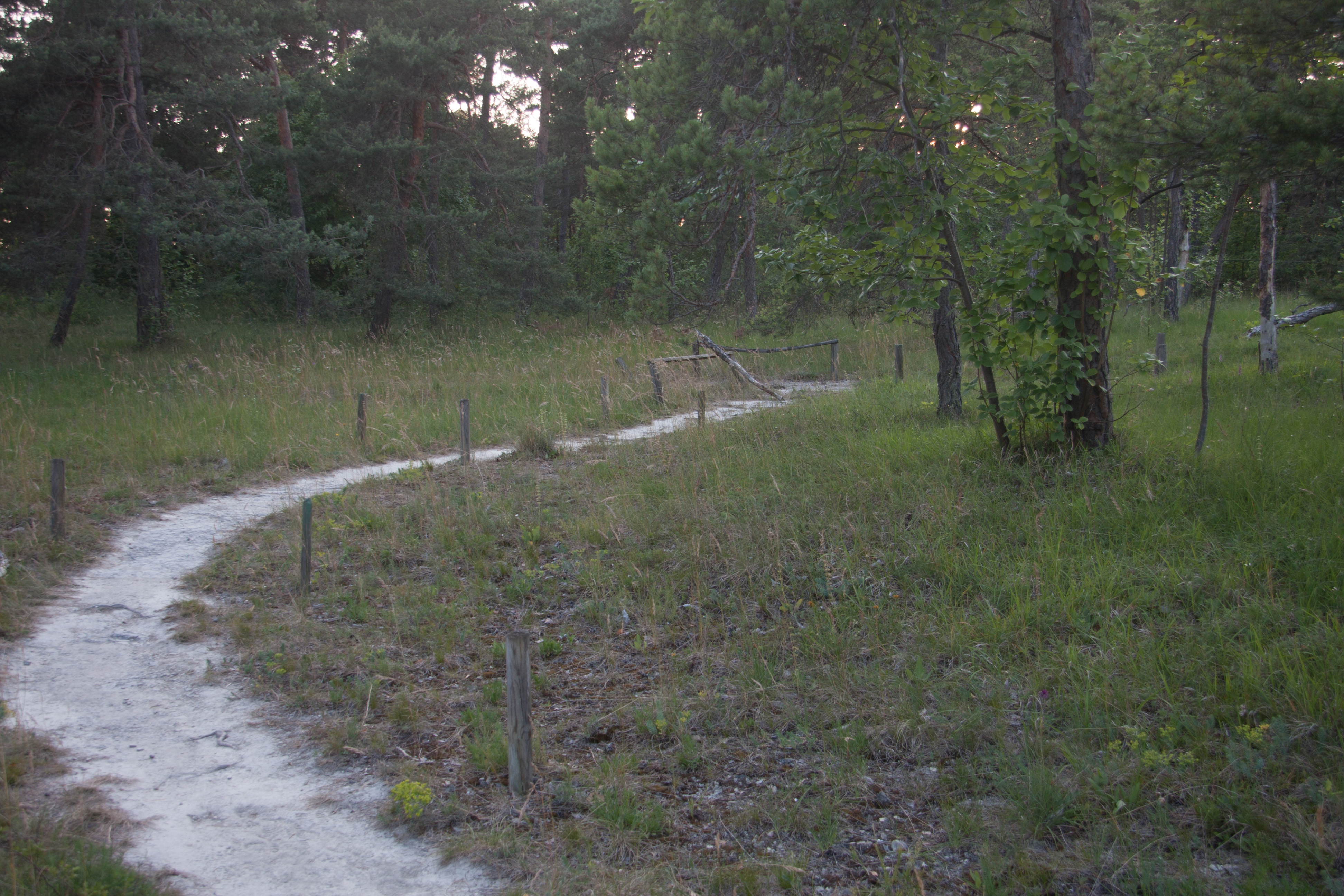 Naturschutzgebiet „Höhfeldplatte und Scharlachberg“: Weg durch Kalktrockenrasen, Höhfeldplatte, Unterfranken, Bayern